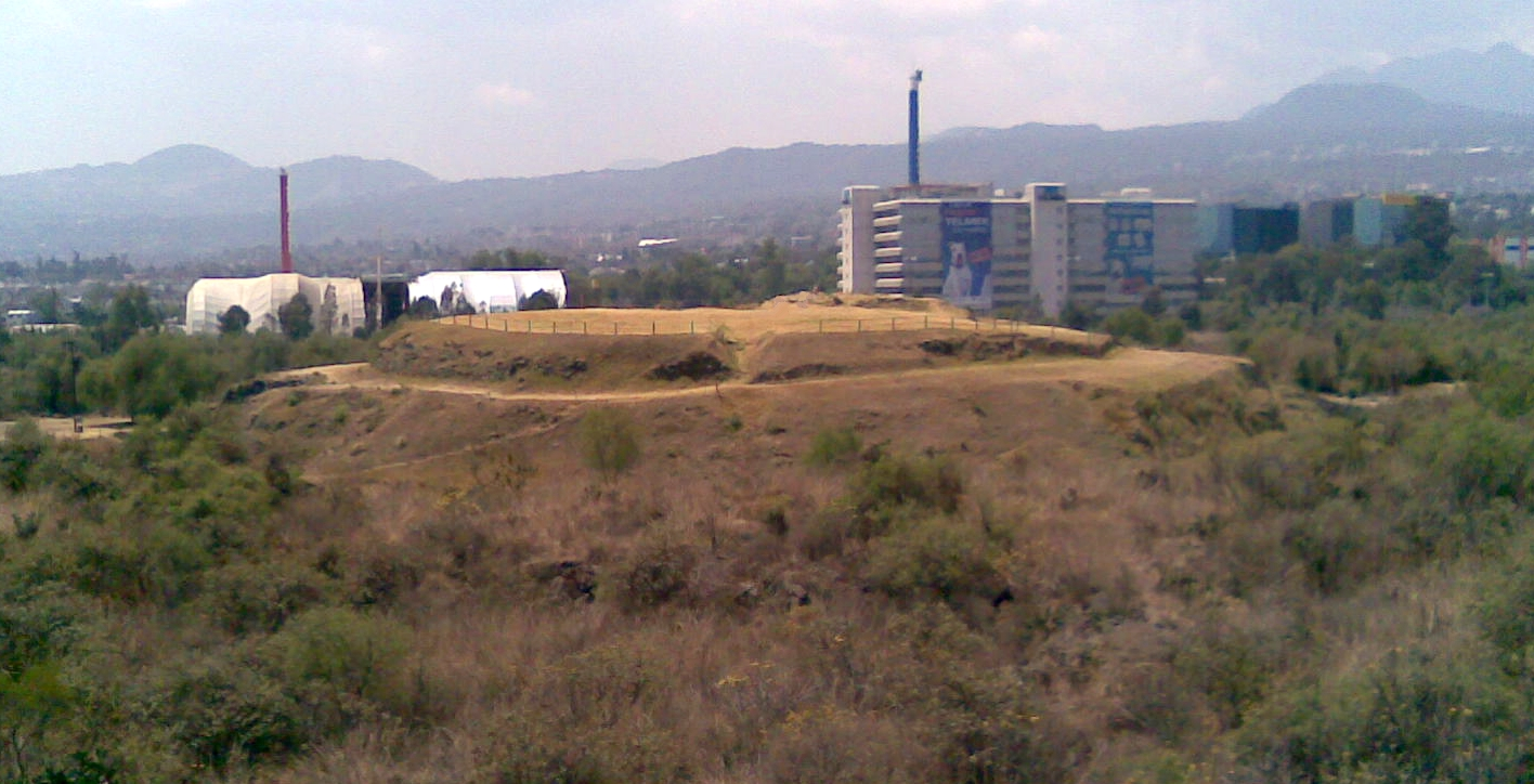 Vista lateral de la Pirámide de Cuicuilco en Coyoacán, México.